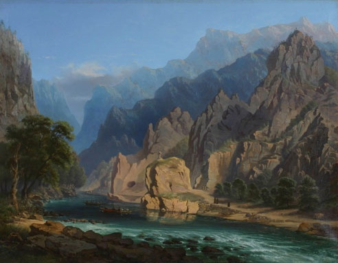 Pe Valea Oltului, ulei pe pânză